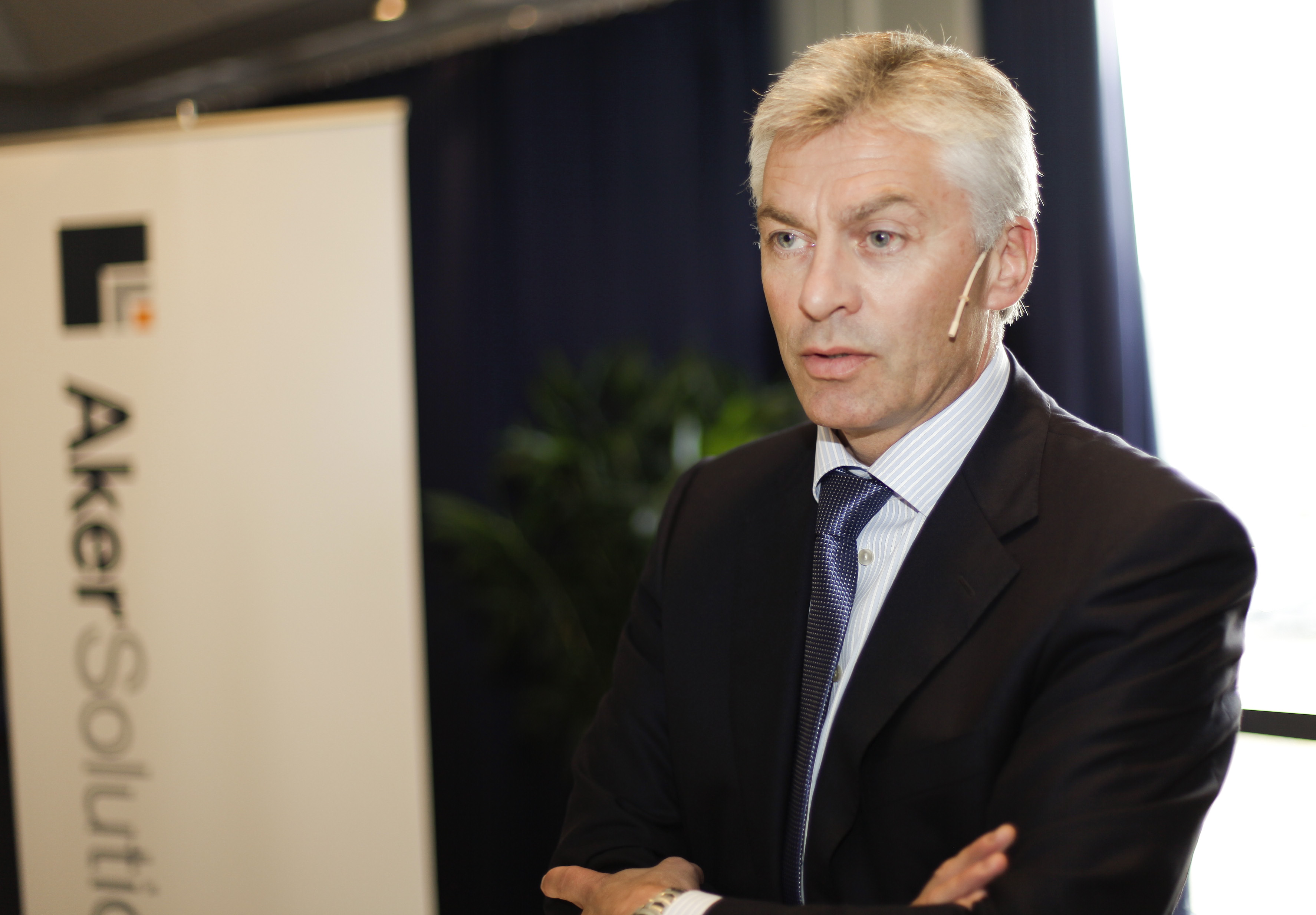 Aker Solutions adm. dir. Simen Lieungh innleder på Ung Energi-frokostmøte 9. juni 2010. Møtet ble arrangert av OLF og NPF, i samarbeid med Aker Solutions.